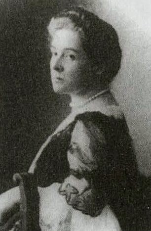 Графиня Надежда Александровна Бобринская, ур. Половцова (1865—1920)